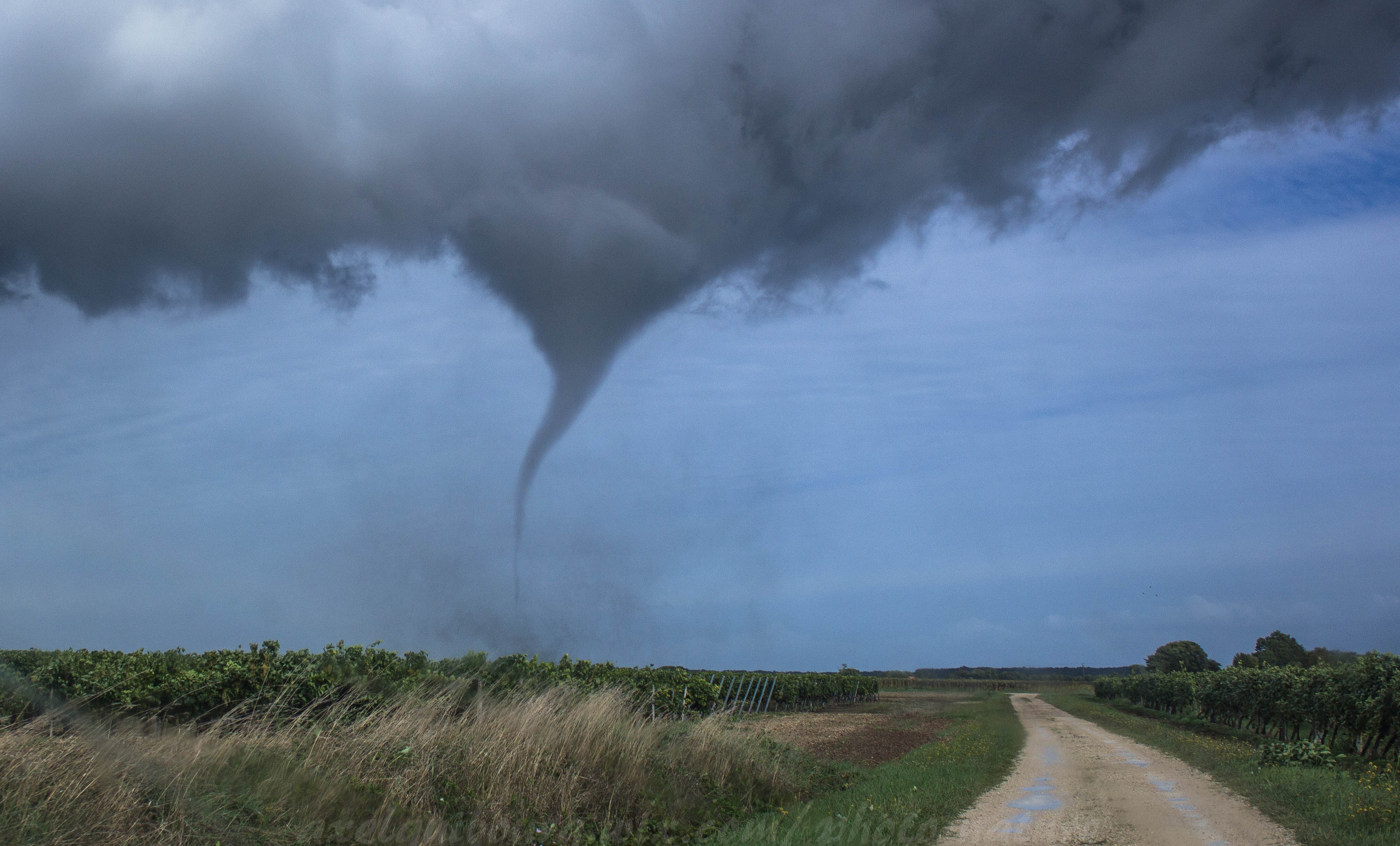 La tornade, qui a frappé Sonnac (Charente-Maritime) en France, à son maximum d'intensité.